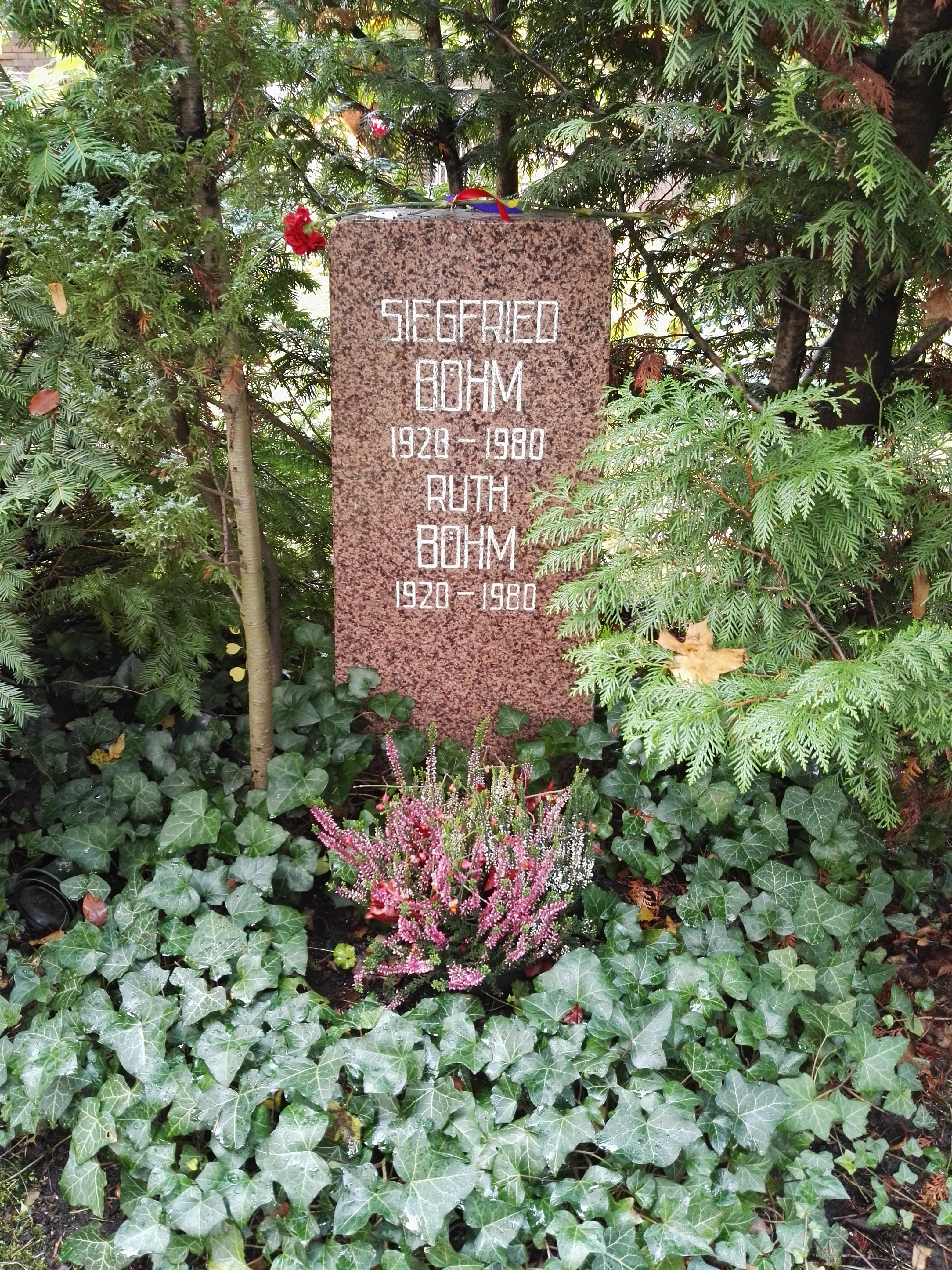 Grab von Siegfried Böhm und Ruth Böhm auf dem Sozialistenfriedhof des Zentralfriedhofs Friedrichsfelde